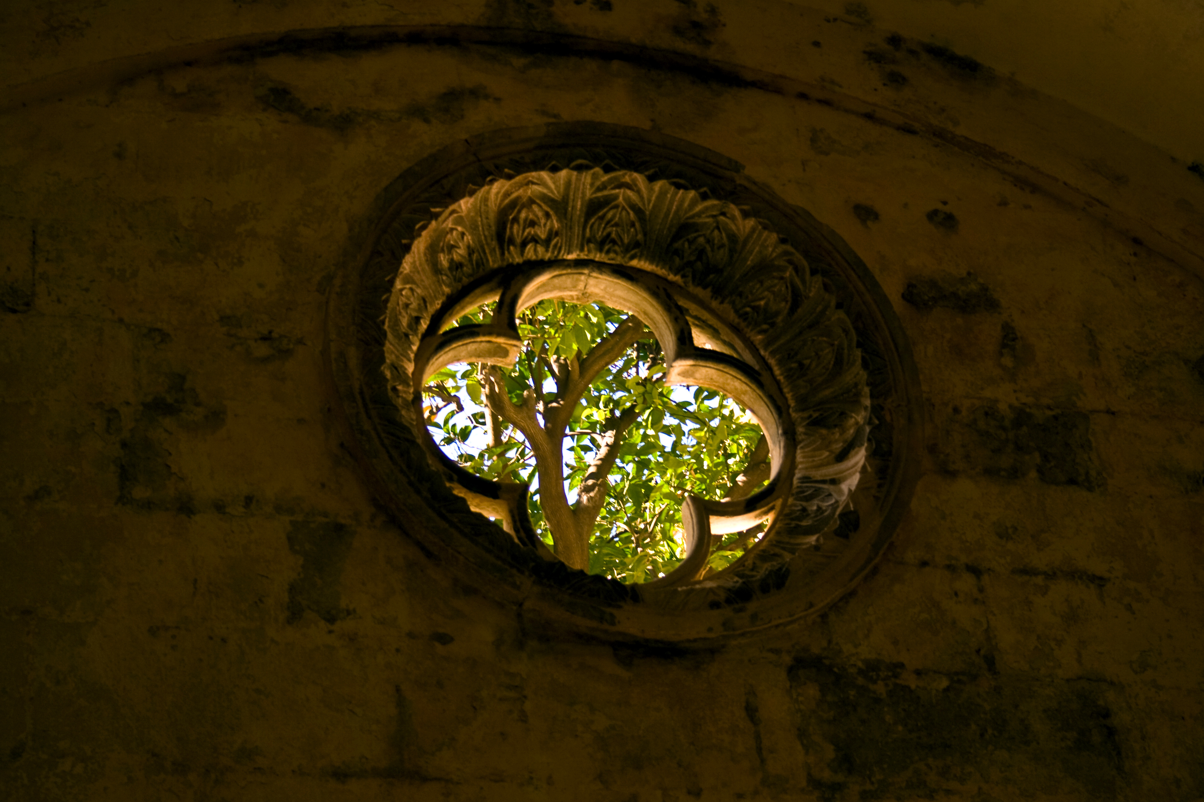 Dubrovnik,_Franziskanerkloster, Detail, Innenhof